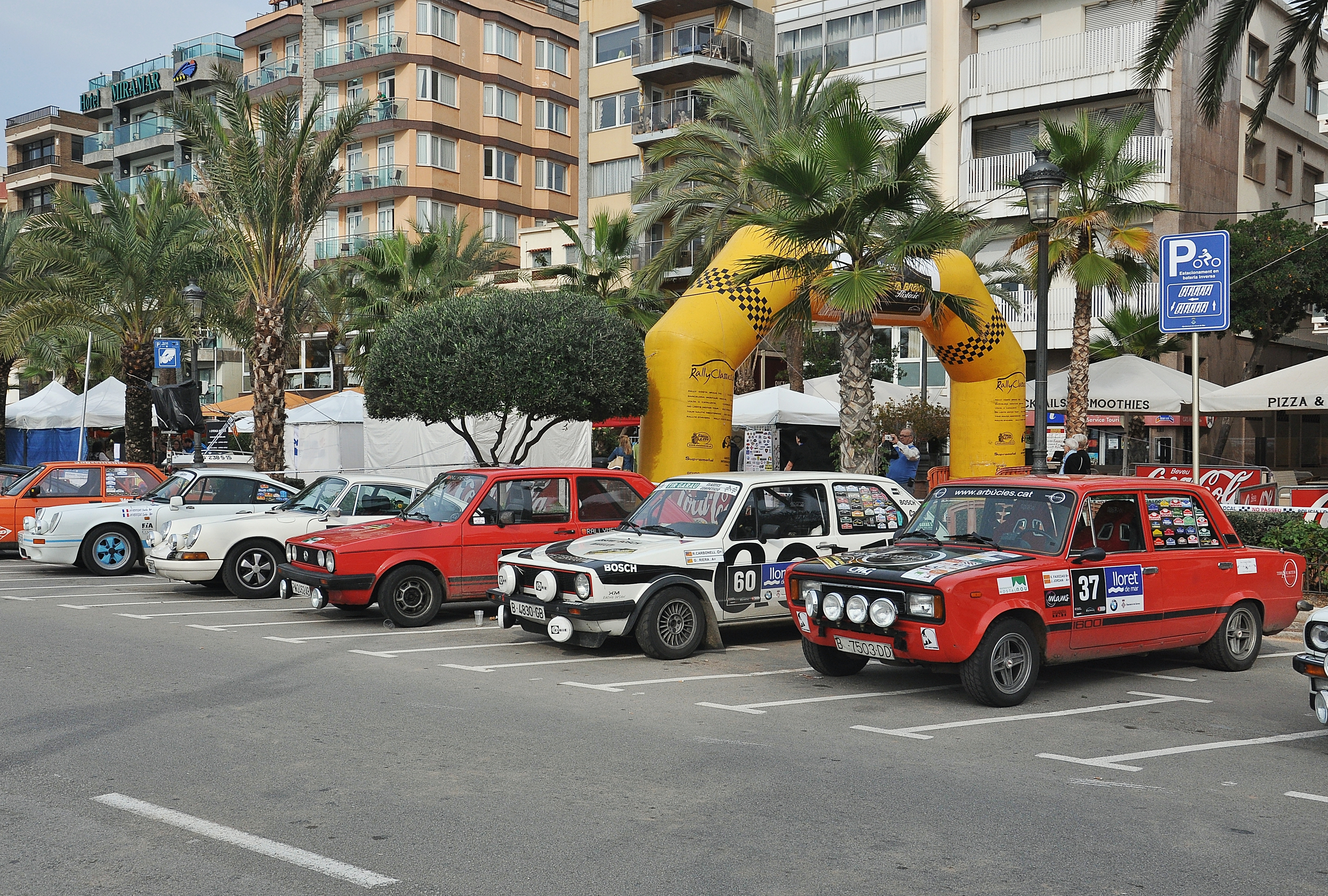 Lloret de Mar-La selva